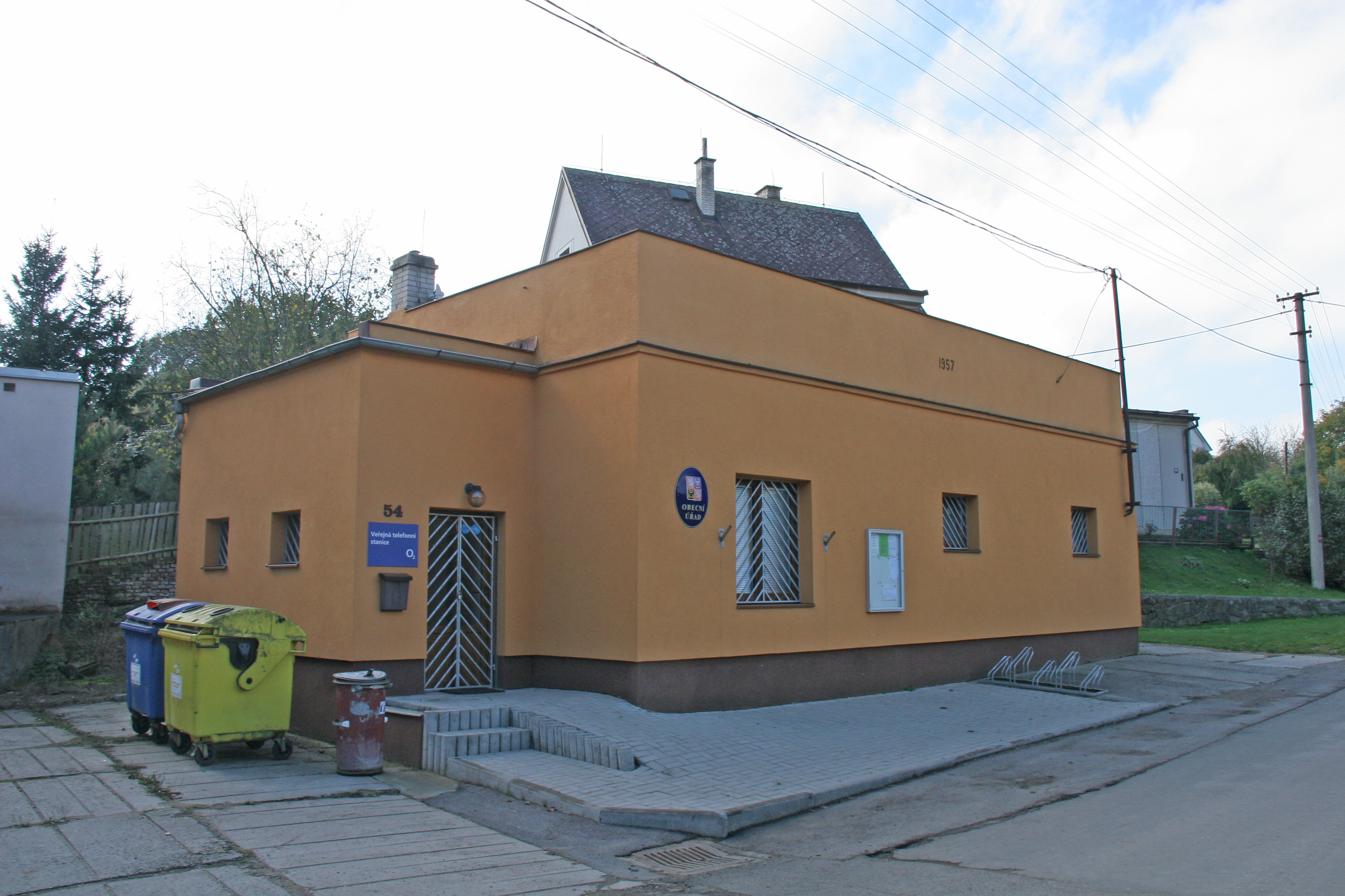 Chyjice obecní úřad